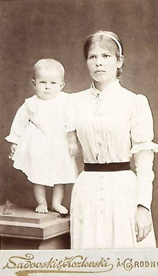 Максім Багдановіч з маці Марыяй Апанасаўнай Багдановіч. г. Гродна. 1892 г.